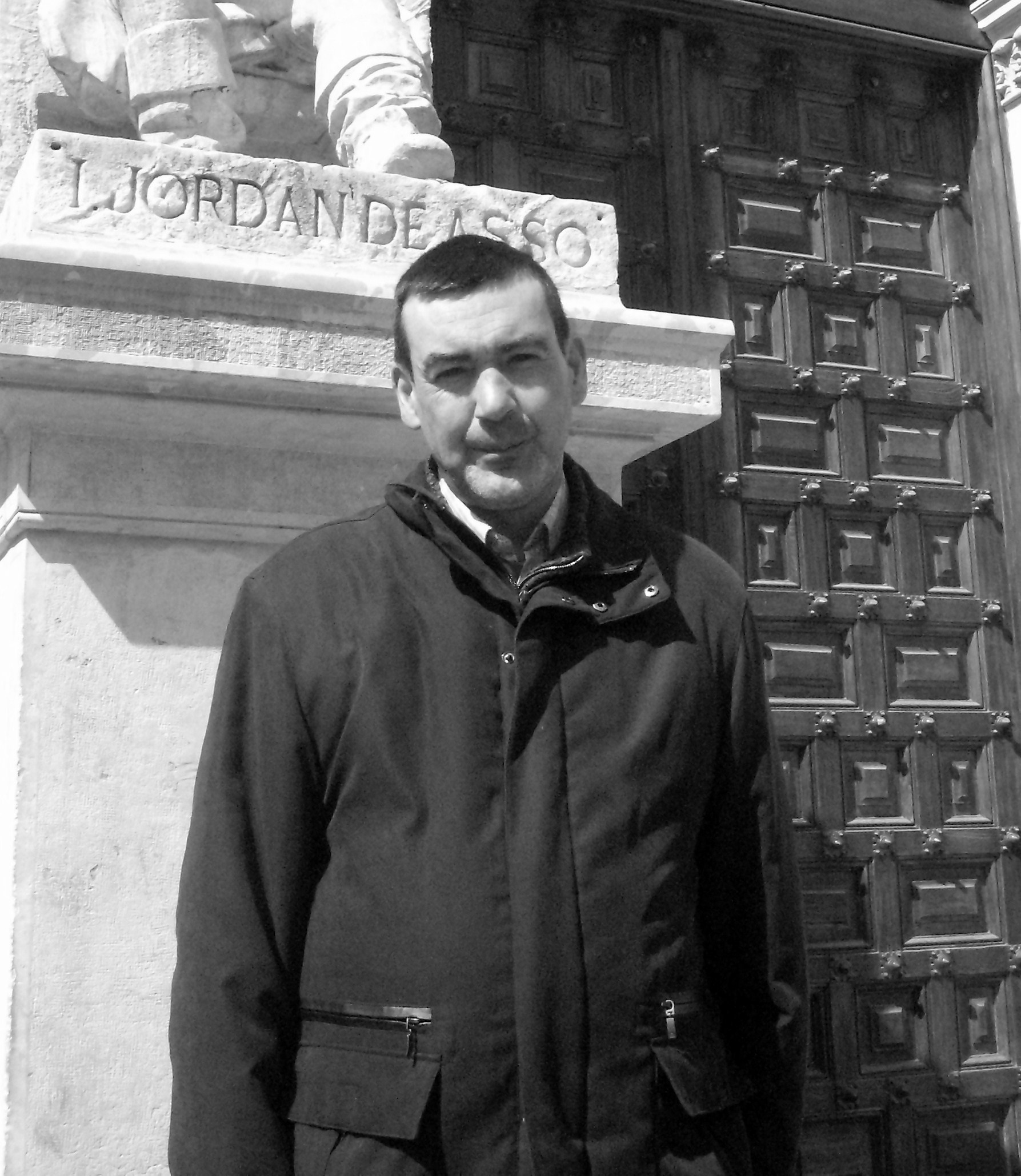 El poeta zaragozano Fernando Mombiela en el Paraninfo Universitario (Zaragoza, 19 de abril de 2012)